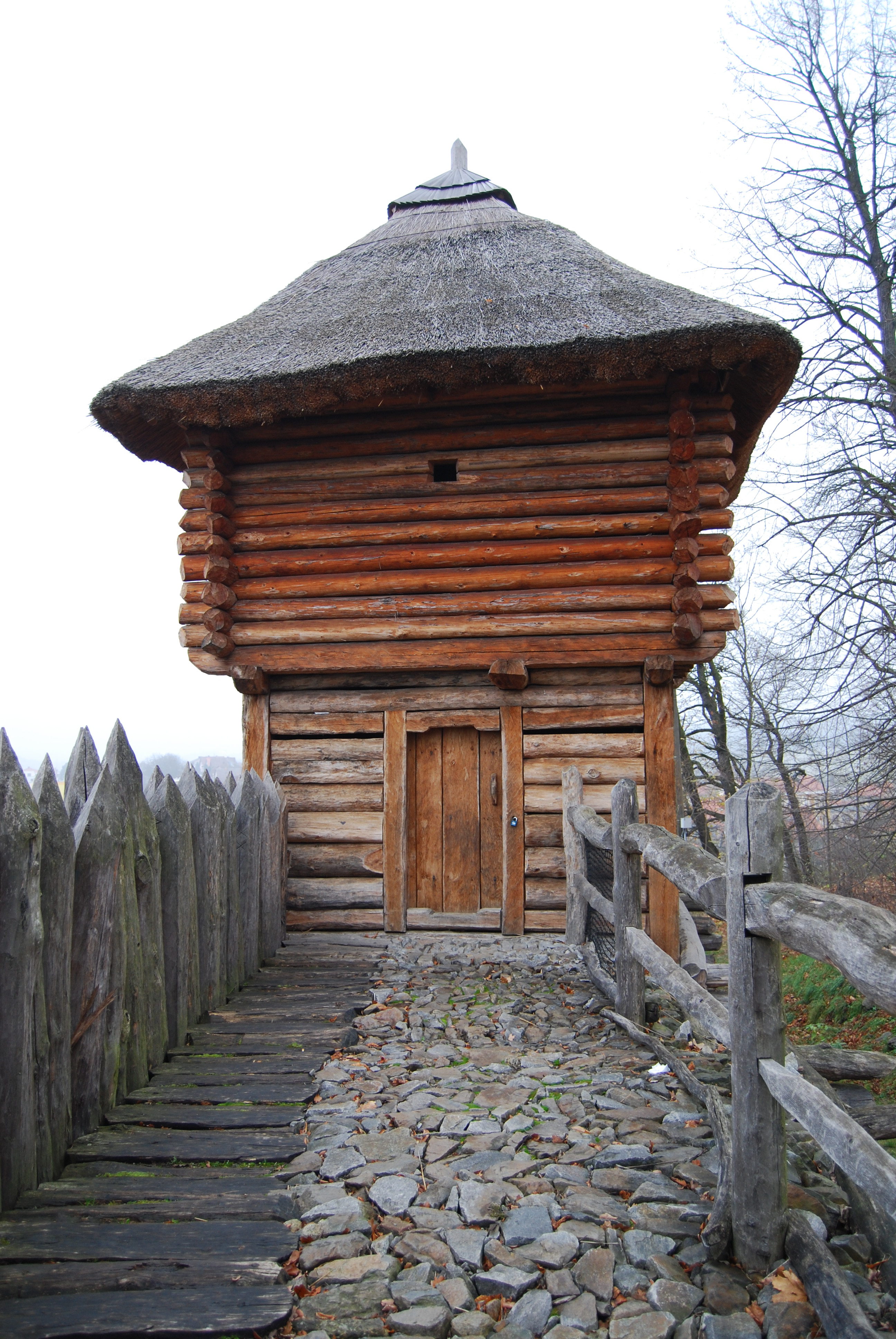 Vyhlídková věž Archeoparku Netolice na vrchu Svatý Ján na okraji města. Netolice. Okres Prachatice. Jihočeský kraj. Česká republika. - Google Maps - Google Earth